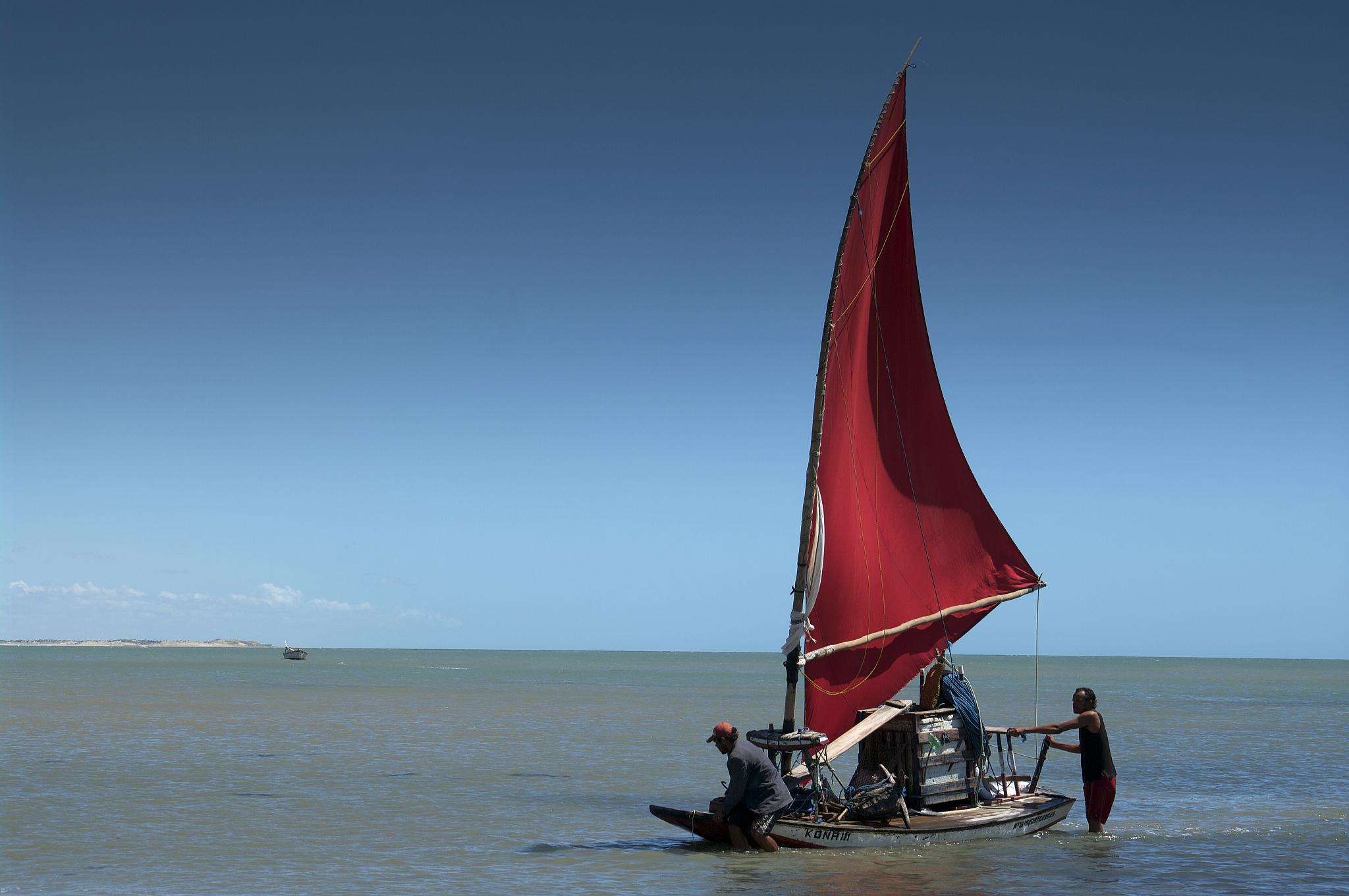 Jangada (1)